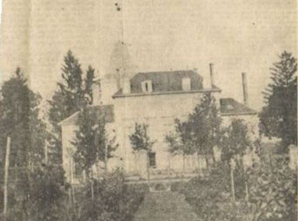 Le château avait une tour qu'il a perdue à l'occasion de transformations opérées par l'occupant des lieux pendant la guerre 39/45